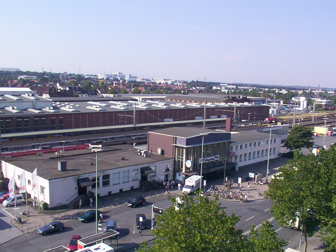 Paderborn Hauptbahnhof, fotografiert von der gegenüberliegenden Agentur für Arbeit aus